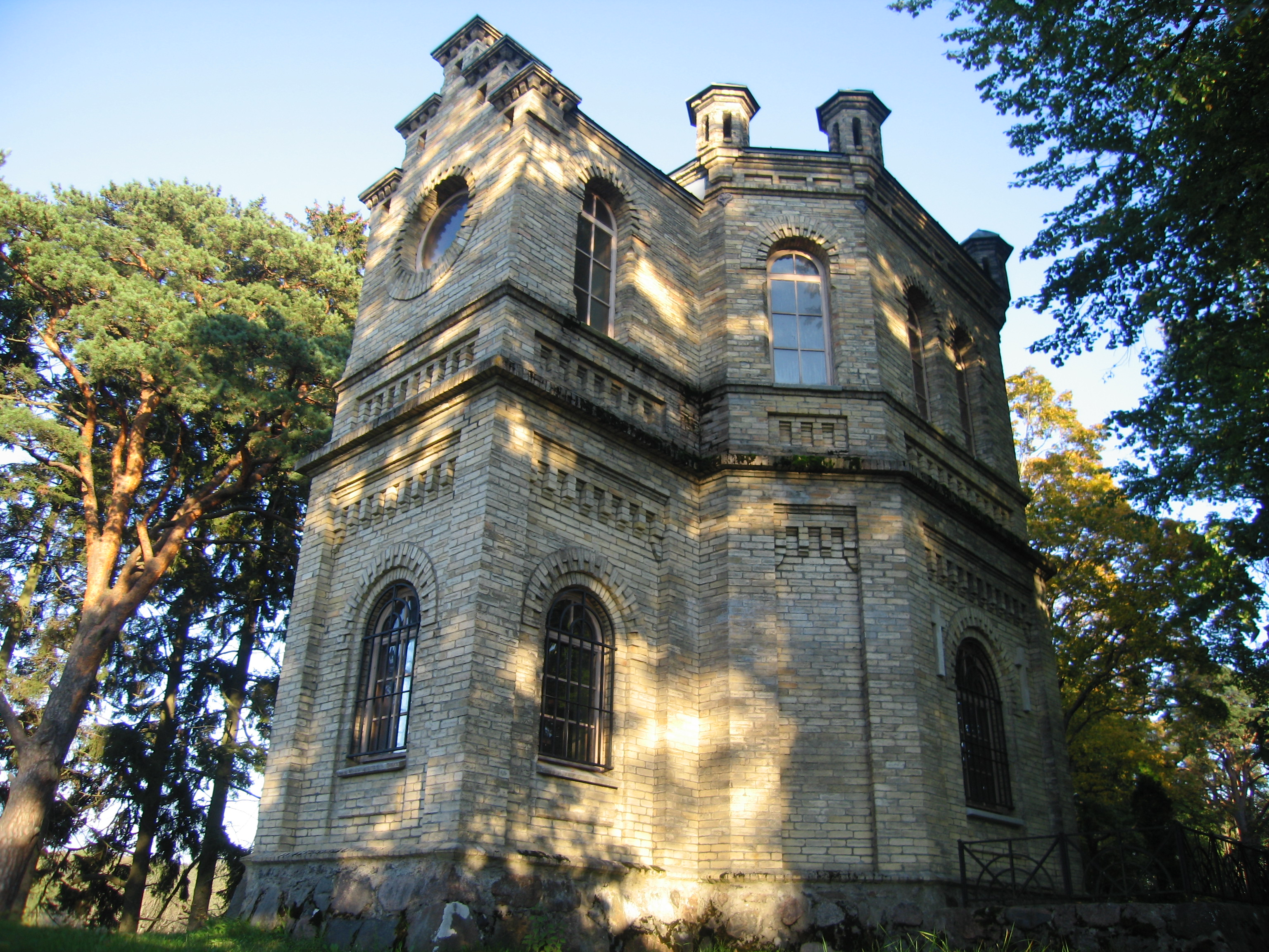 Kose mõisa kalmistu kabeli tagantvaade